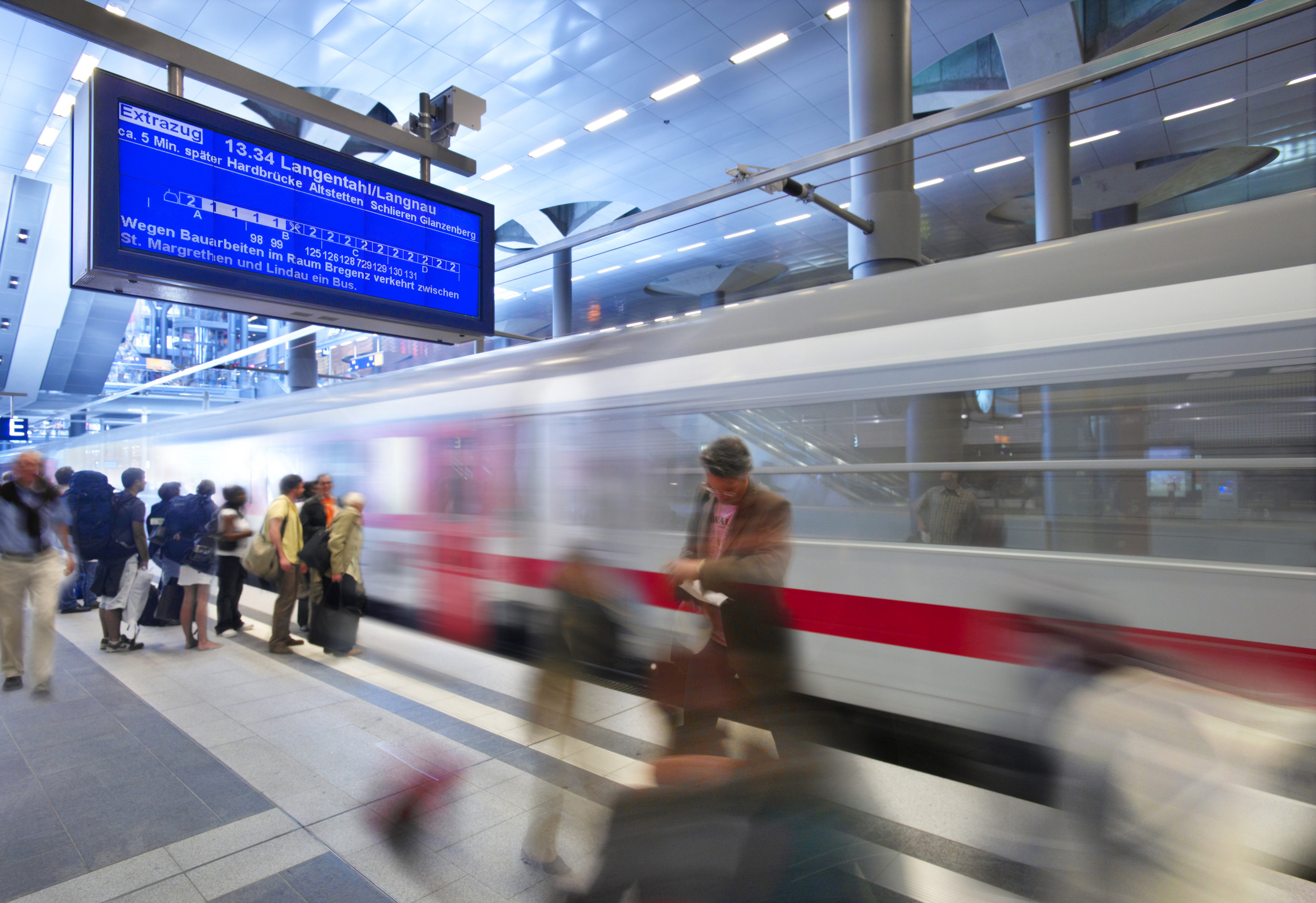 Perronanzeiger von Funkwerk für die SBB.